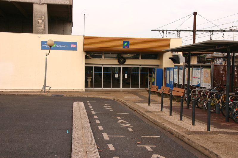 Gare de Combs-La-Ville - Quincy